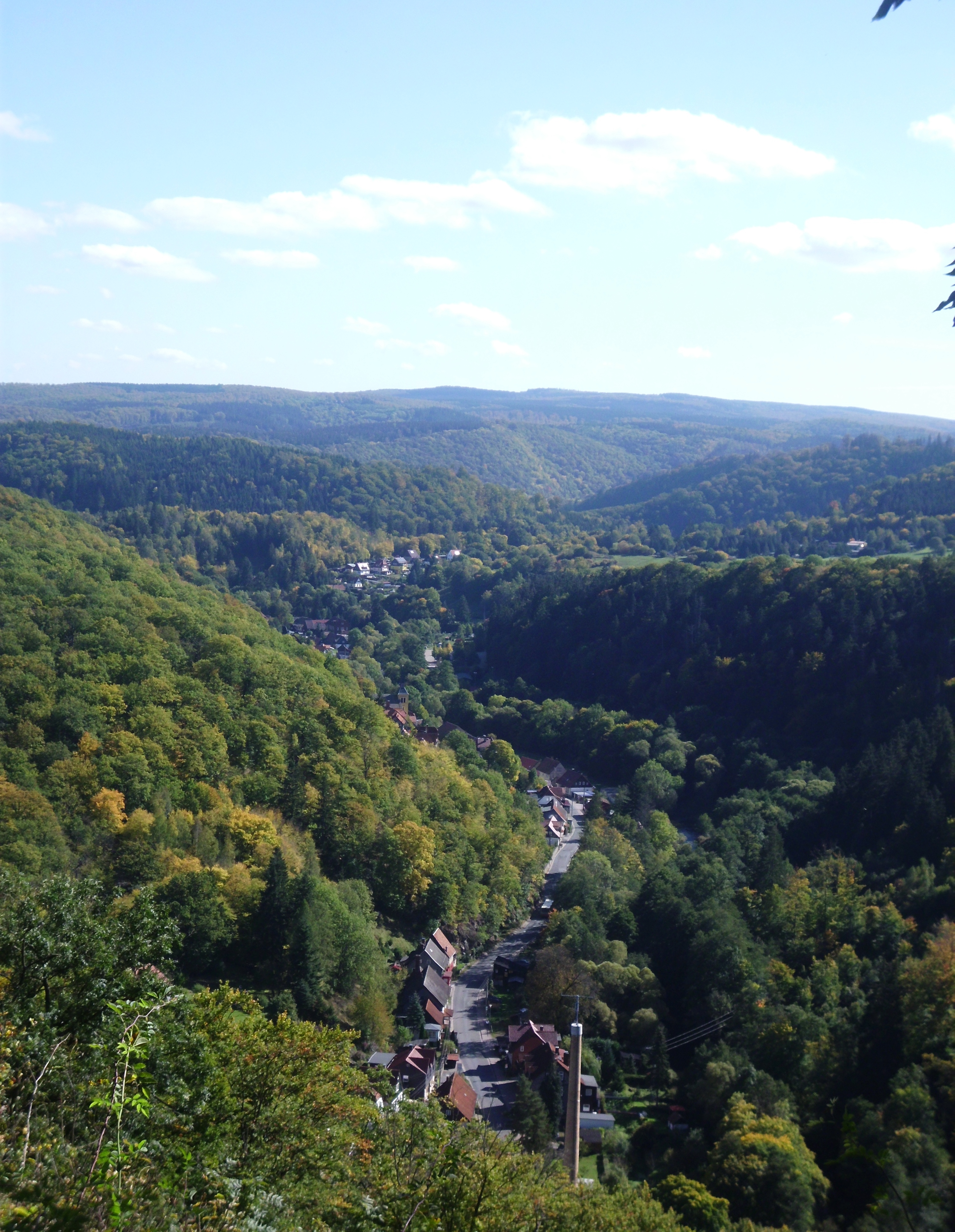 Aussichtspunkt Schöneburg bei Altenbrak, Stadt Thale